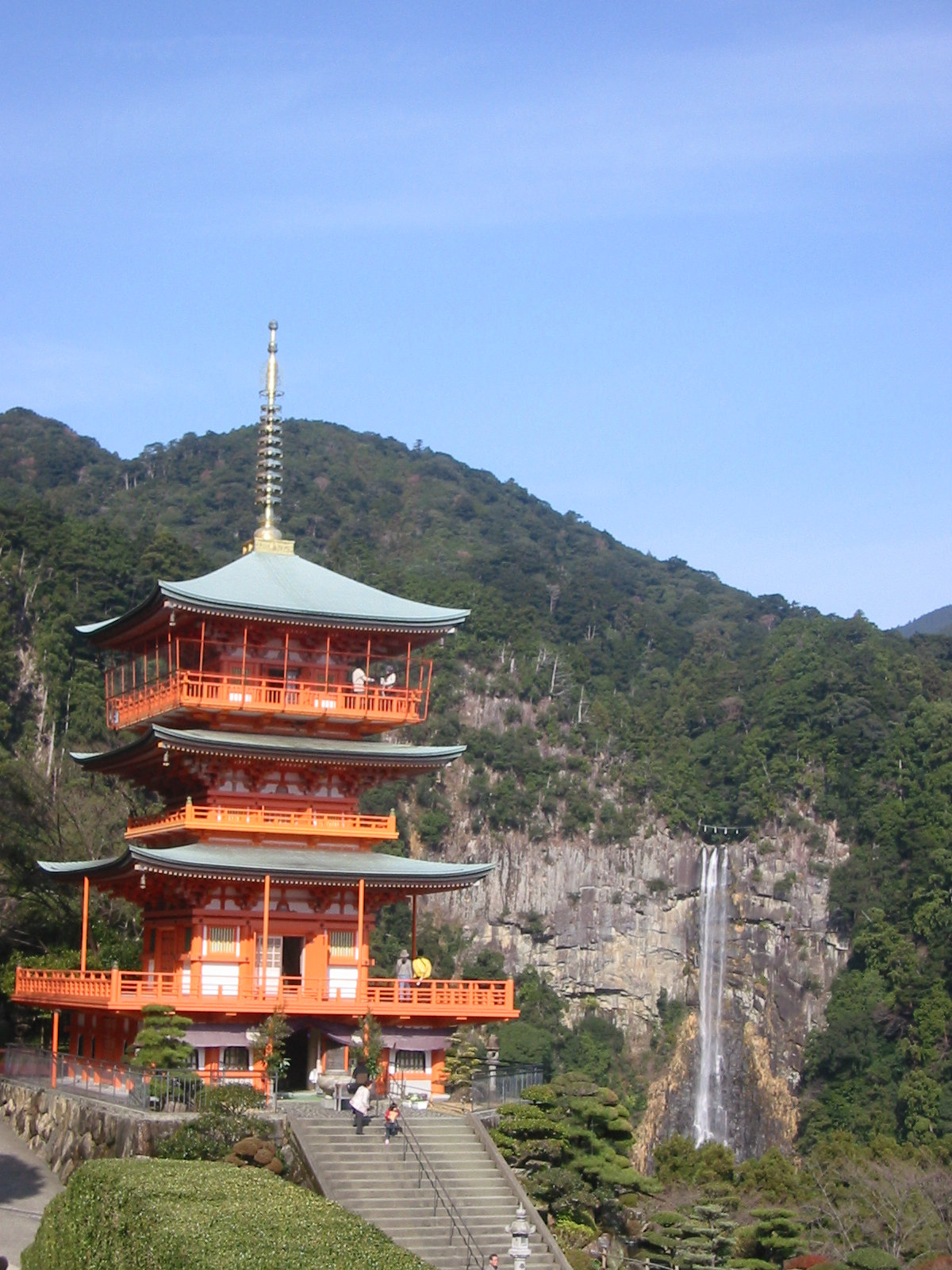 青岸渡寺